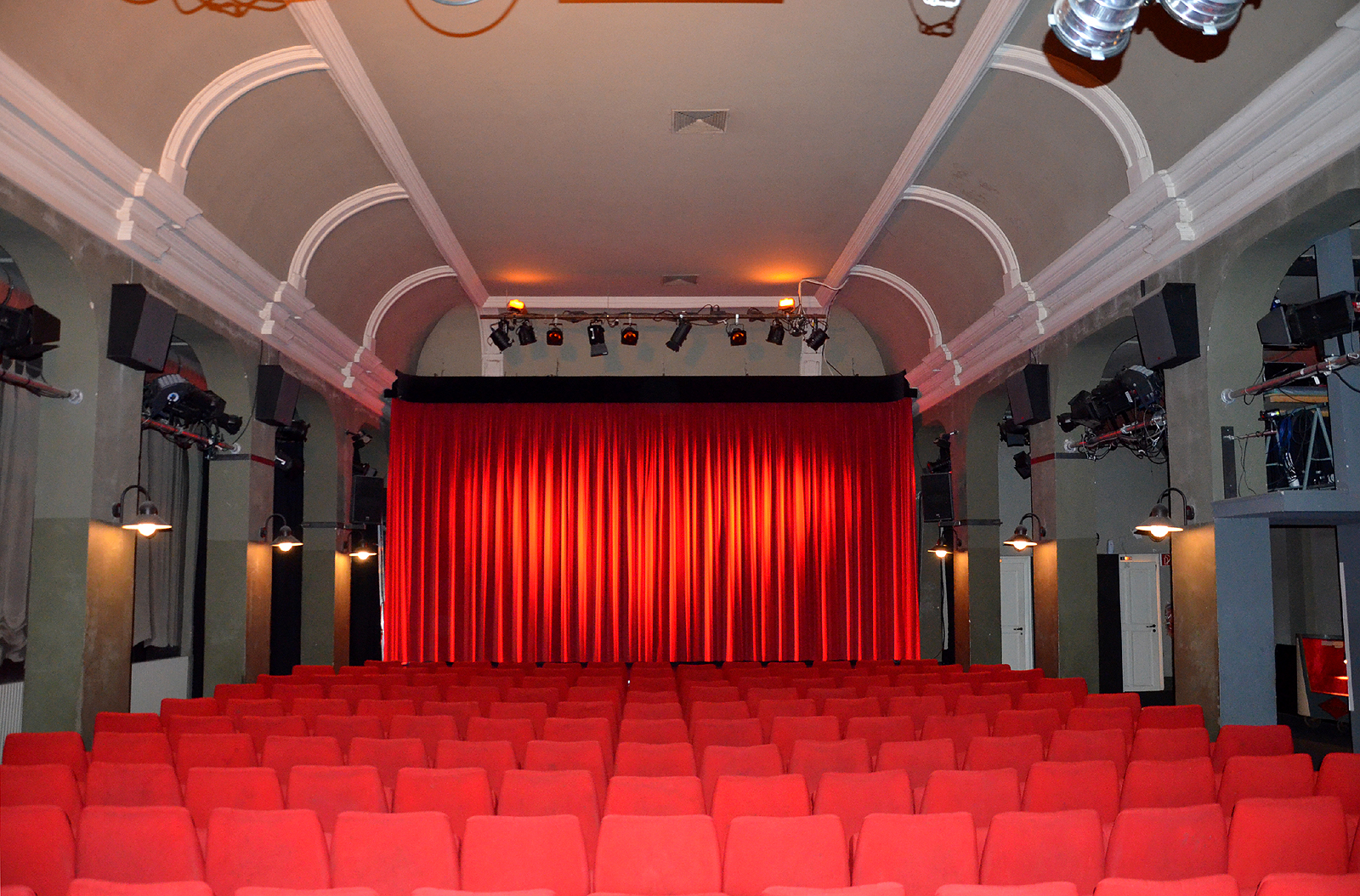 Der Saal des "Apollo-Kinos" (offiziell: Apollo - Studio für Filmkunst), 1908 in einem Hofgebäude an der Limmerstraße 50 in Linden gegründet und heute eines der ältesten Programmkinos in Deutschland, dient zugleich als Bühne für den Entertainer, Zauberkünstler, Moderator und Kabarettististen DESiMO ("DESiMOs Spezial Club") ...